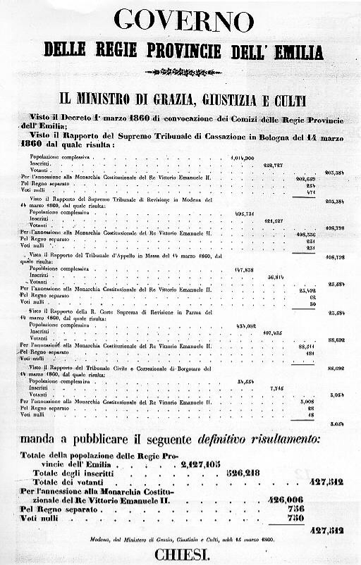 Governo delle Regie Provincie dell'Emilia - Risultamento dei comizi 1860